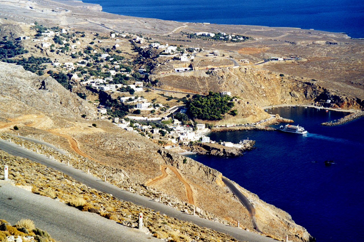 Blick von der Passstrasse auf Chora Sfakion, Kreta